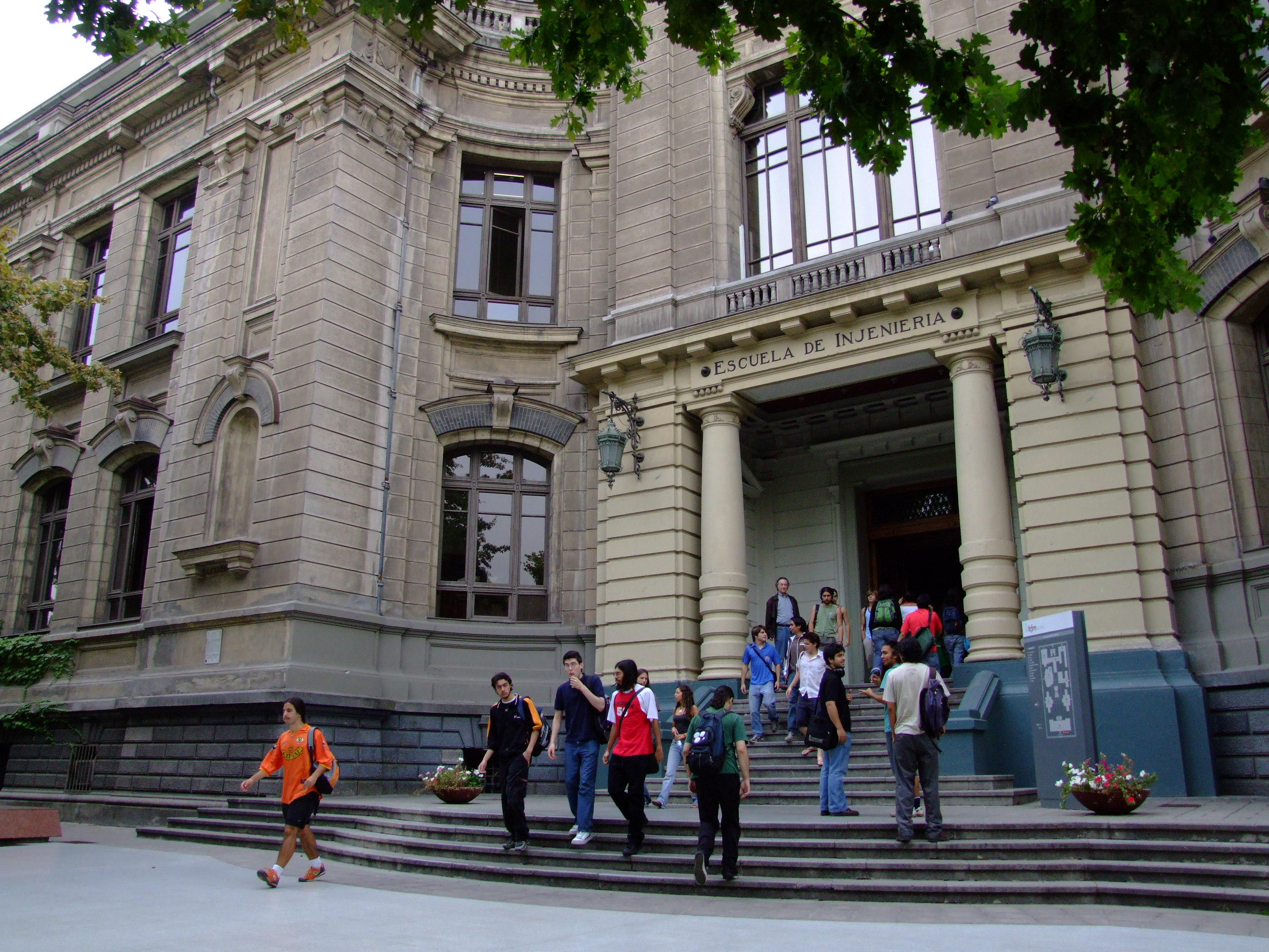 Frontis del edificio de la Facultad de Ciencias Fisicas y Matemáticas de la Universidad de Chile.